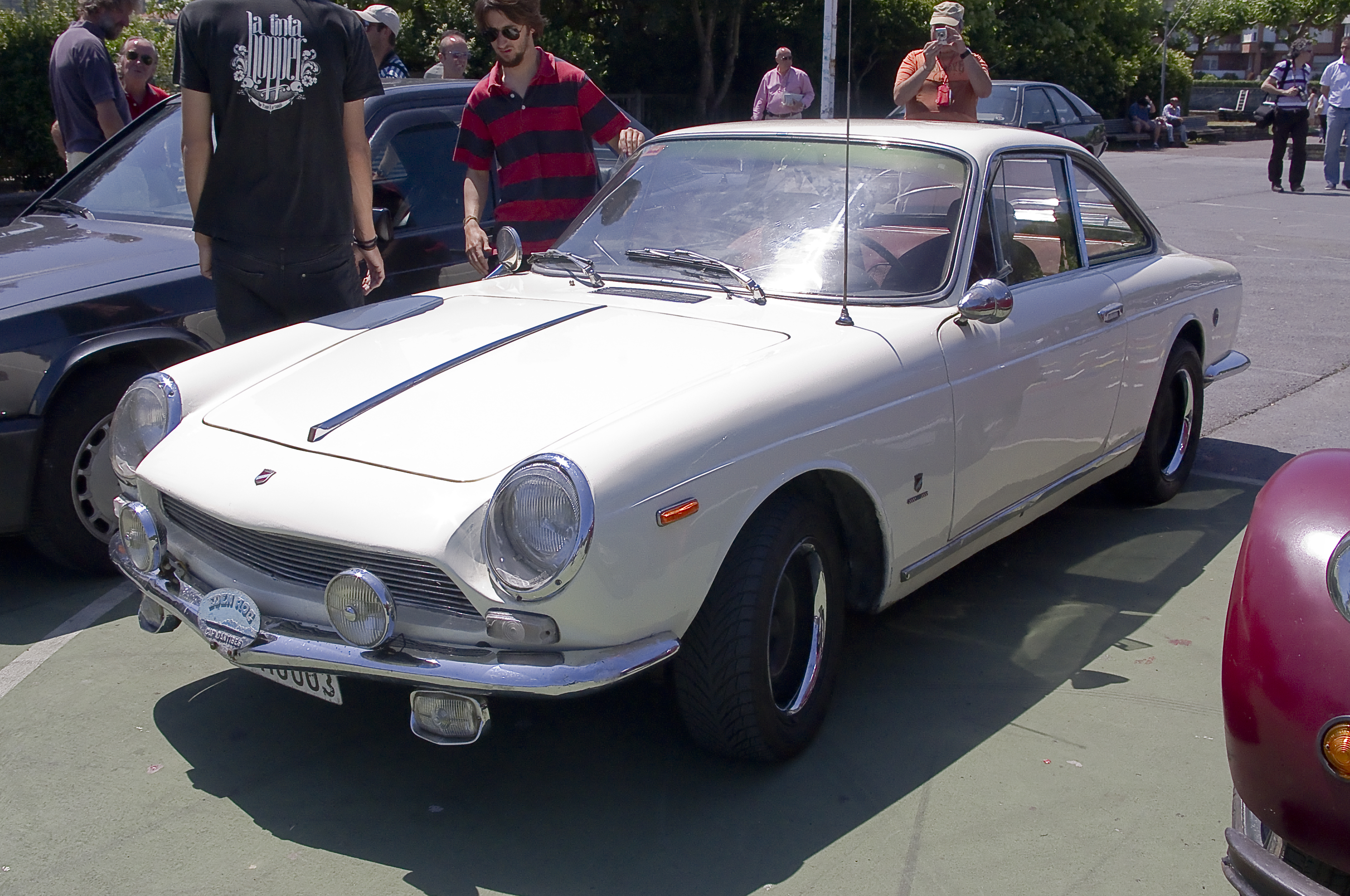 1967 Moretti 1500 SS Coupé